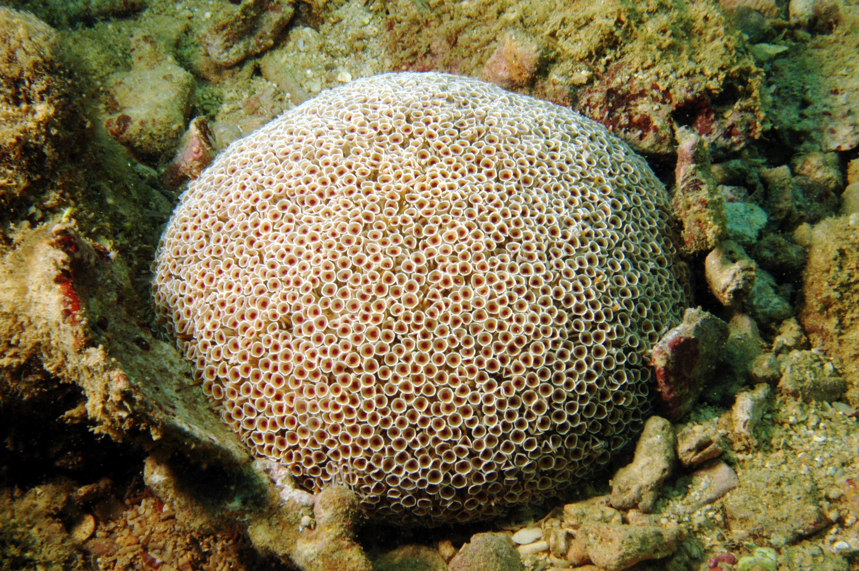 Toxopneustes pileolus. Okinawa. 5m. Japan.